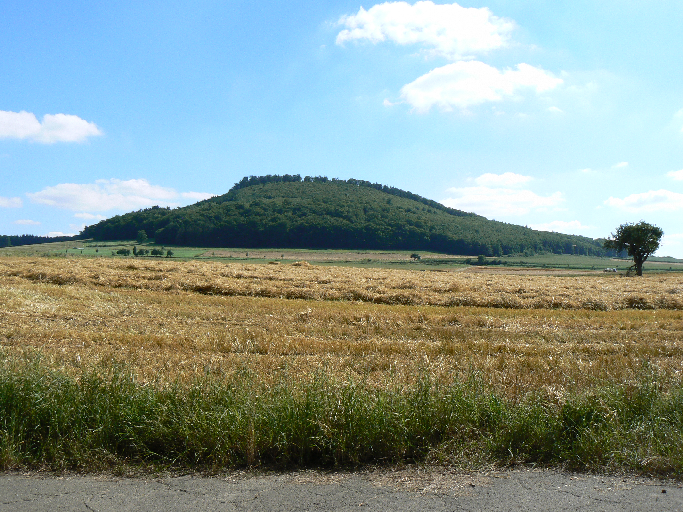 Der Veitskopf nahe Wassenach in der Eifel